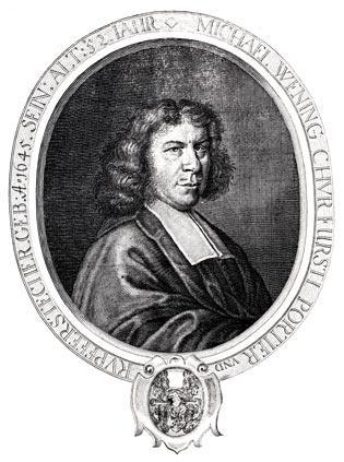 Michael Wening (1645—1718), Hofkupferstecher bei Kurfürst Ferdinand Maria von Bayern (1636—1679).